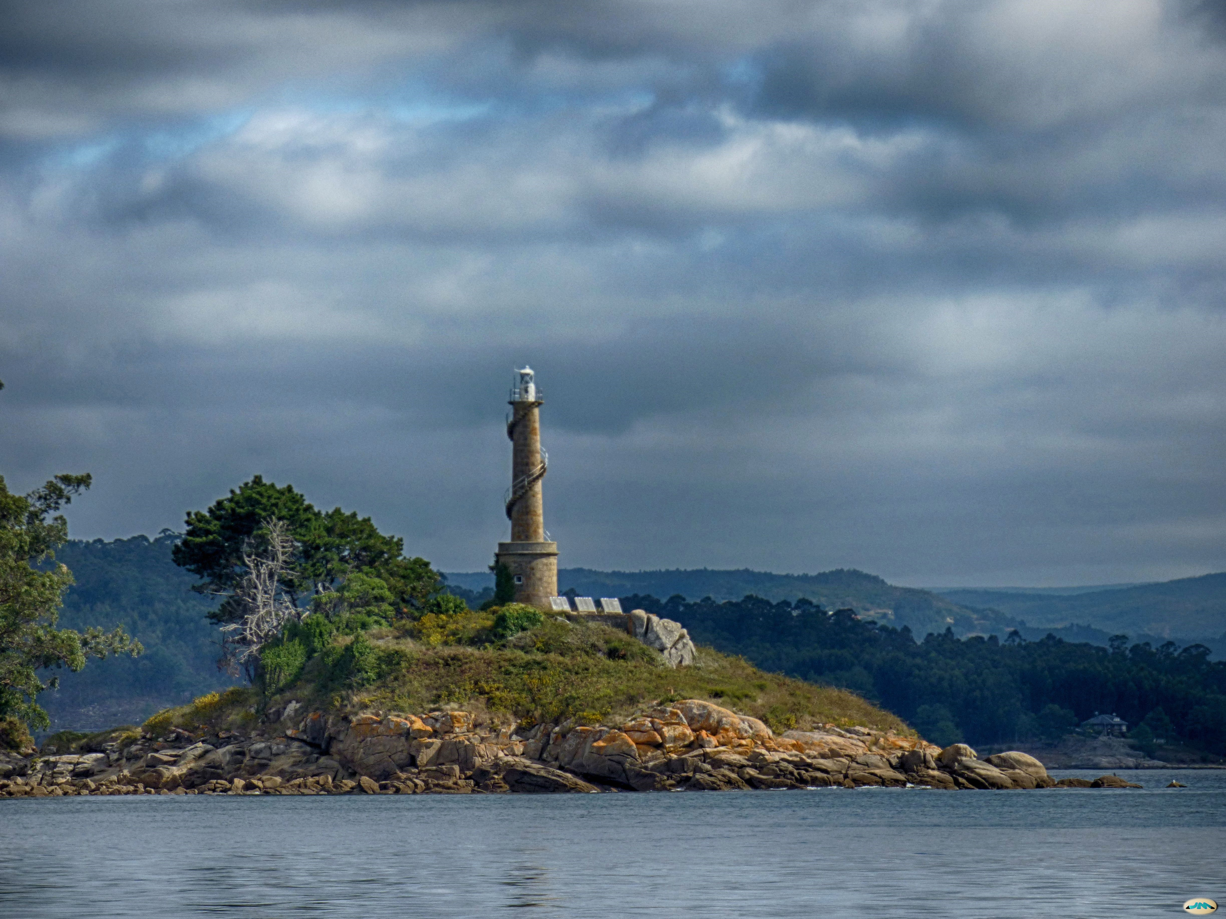 Faro da illa de Tambo.